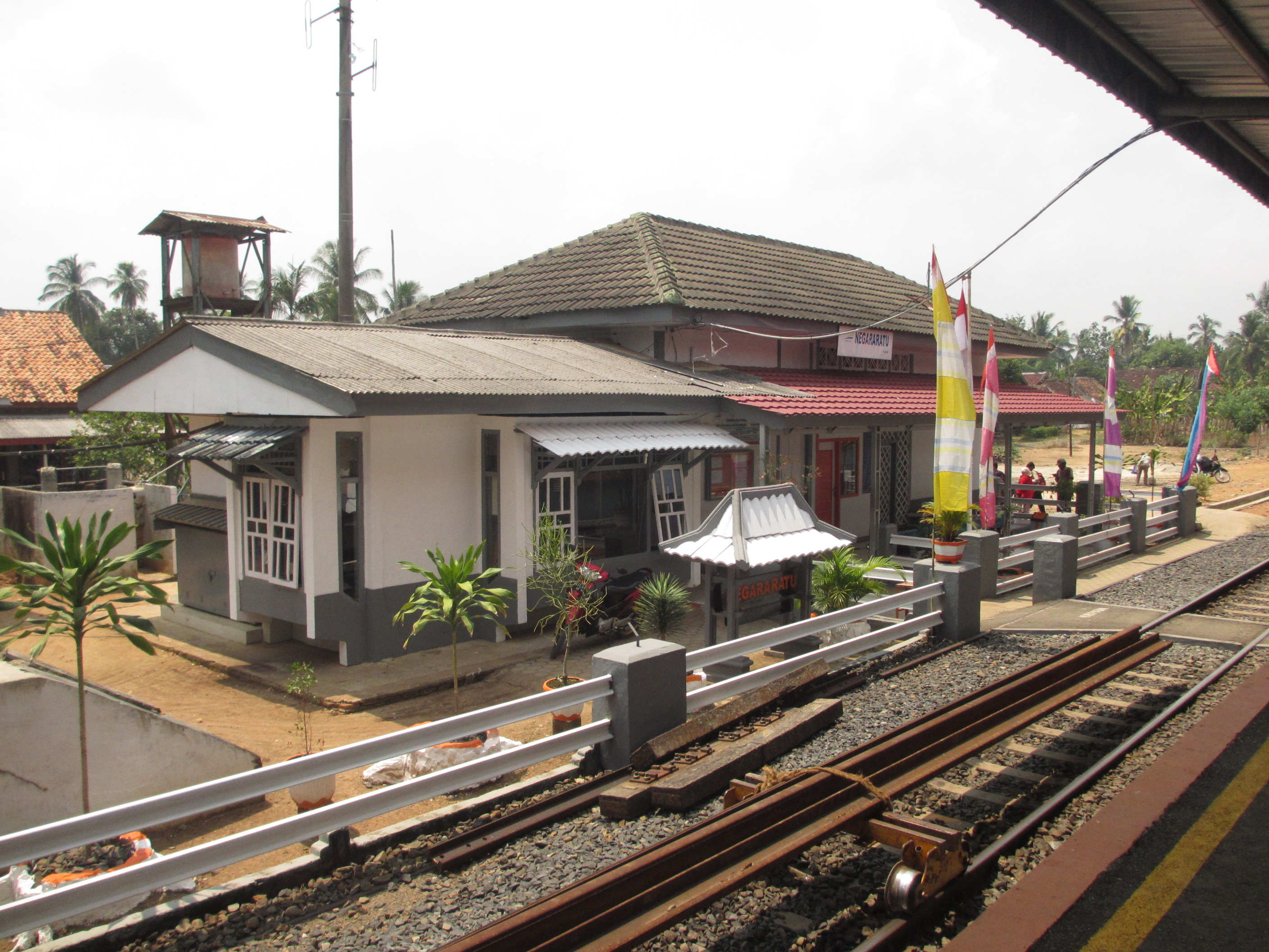 Stasiun Negararatu.